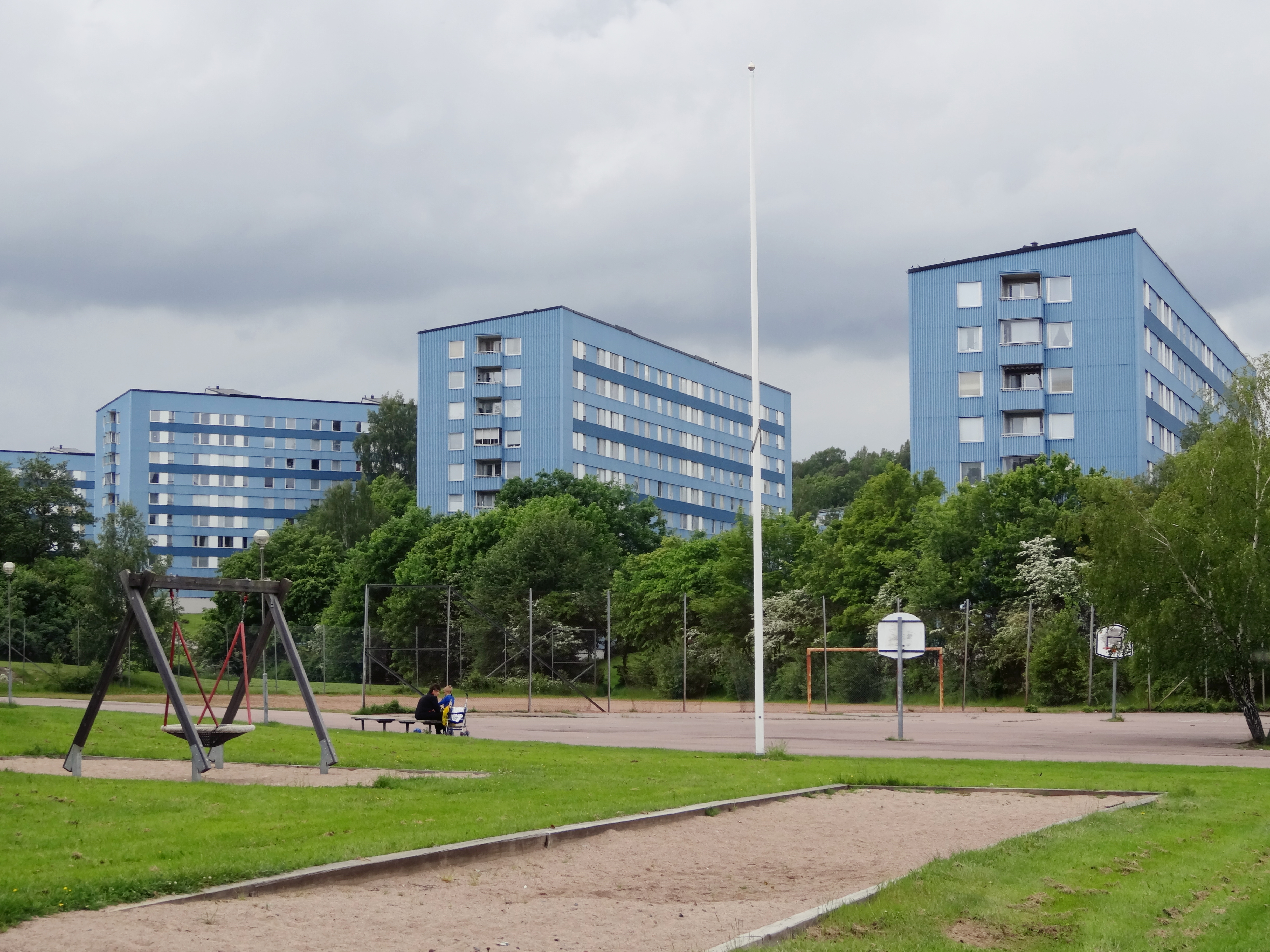 Blå staden, ett bostadsområde i Backa i Göteborg.